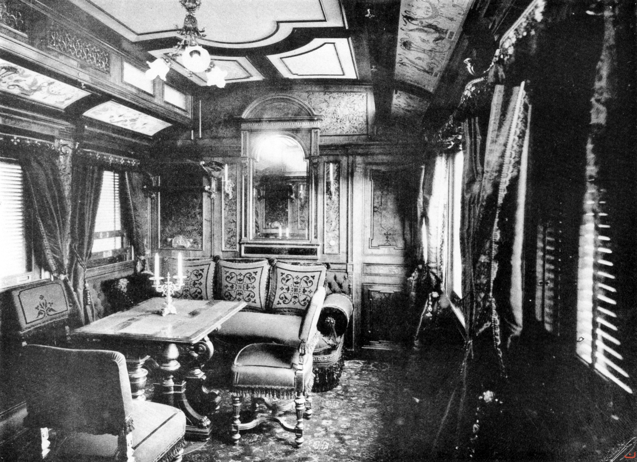 k.u.k. Hofzug Salon im Hofsuitesalonwagon